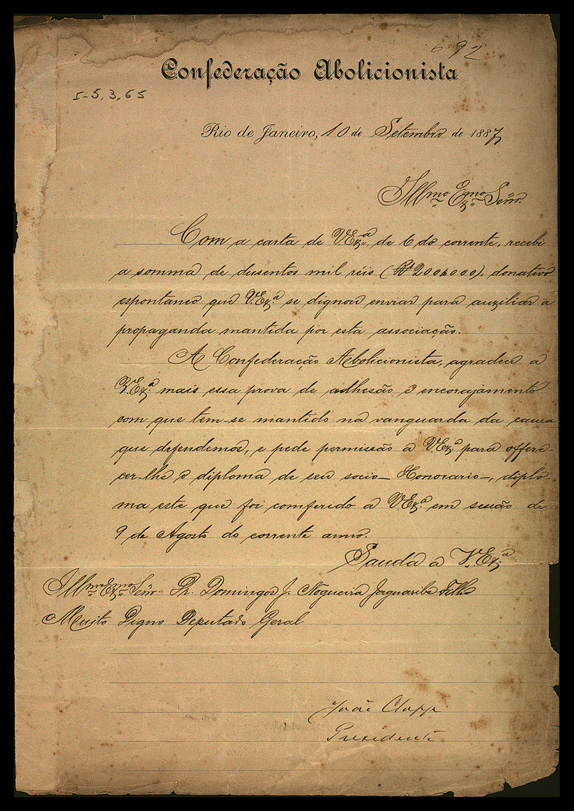 Ofício assinado por João Clapp e dirigido ao Dr. Jaguaribe, agradecendo em nome da "Confederação Abolicionista" o donativo enviado para auxiliar a propaganda desta confederação